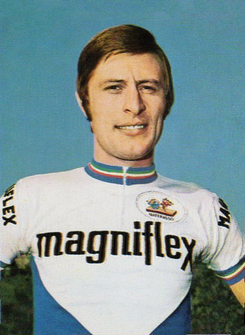 FIGURINA PANINI CAMPIONI DELLO SPORT ANNO 1973/74 N. 170 CICLISMO BOIFAVA